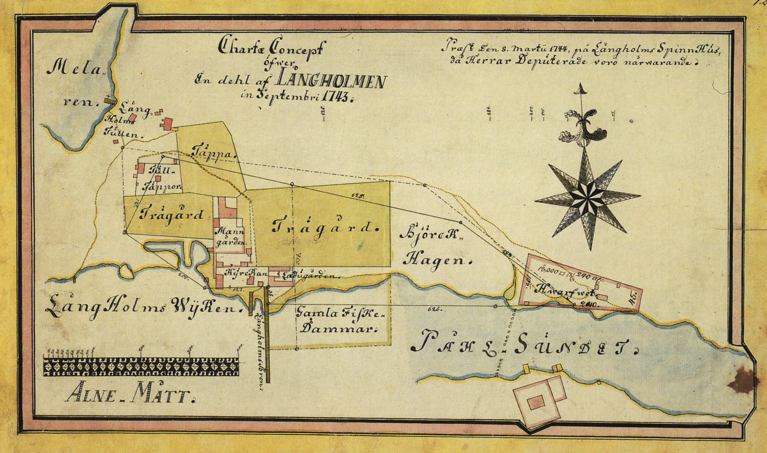 Karta över Långholmens spinnhus 1743